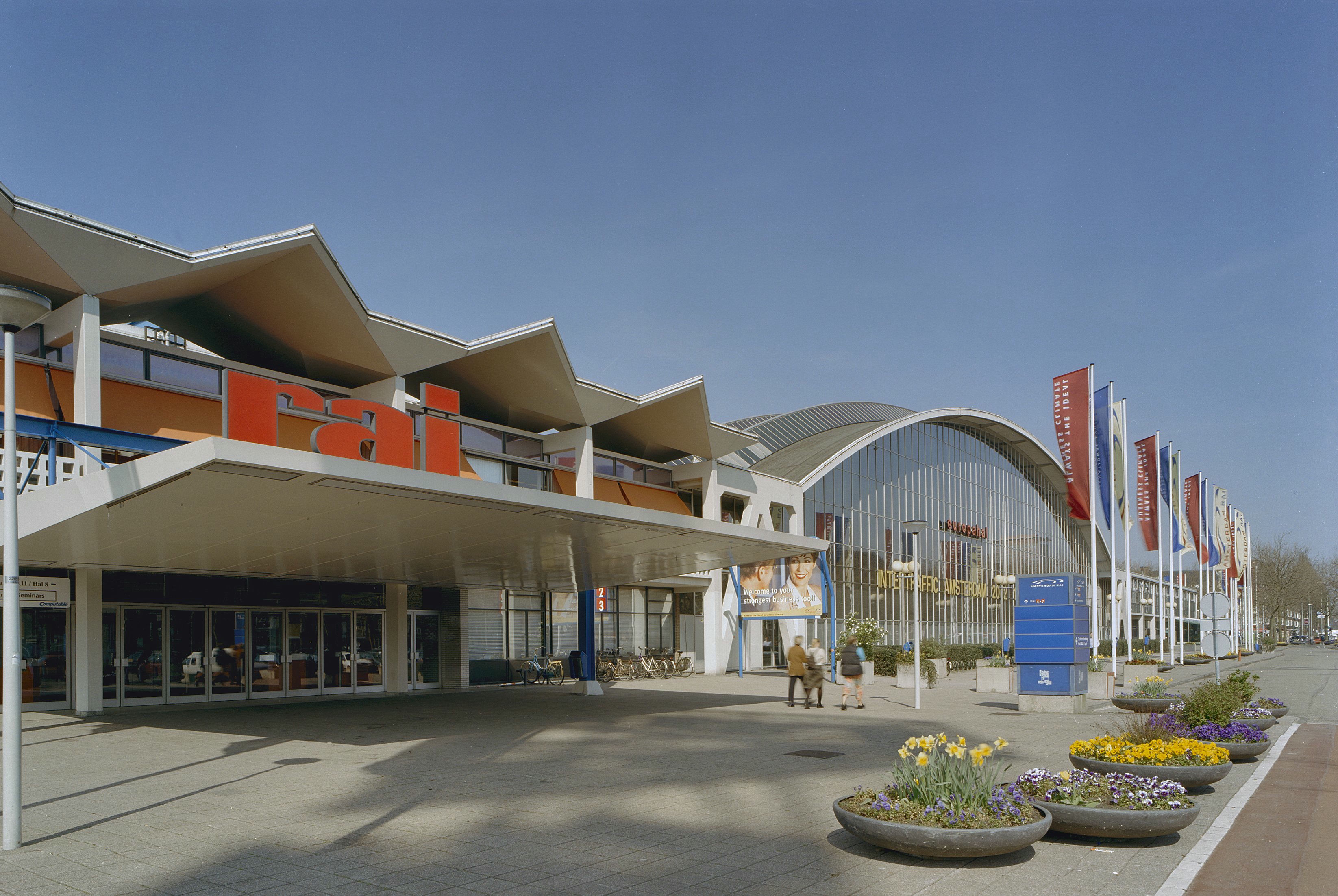 RAI-complex: Overzicht gedeelte voorgevel (opmerking: Gefotografeerd voor Toonbeelden van de Wederopbouw)